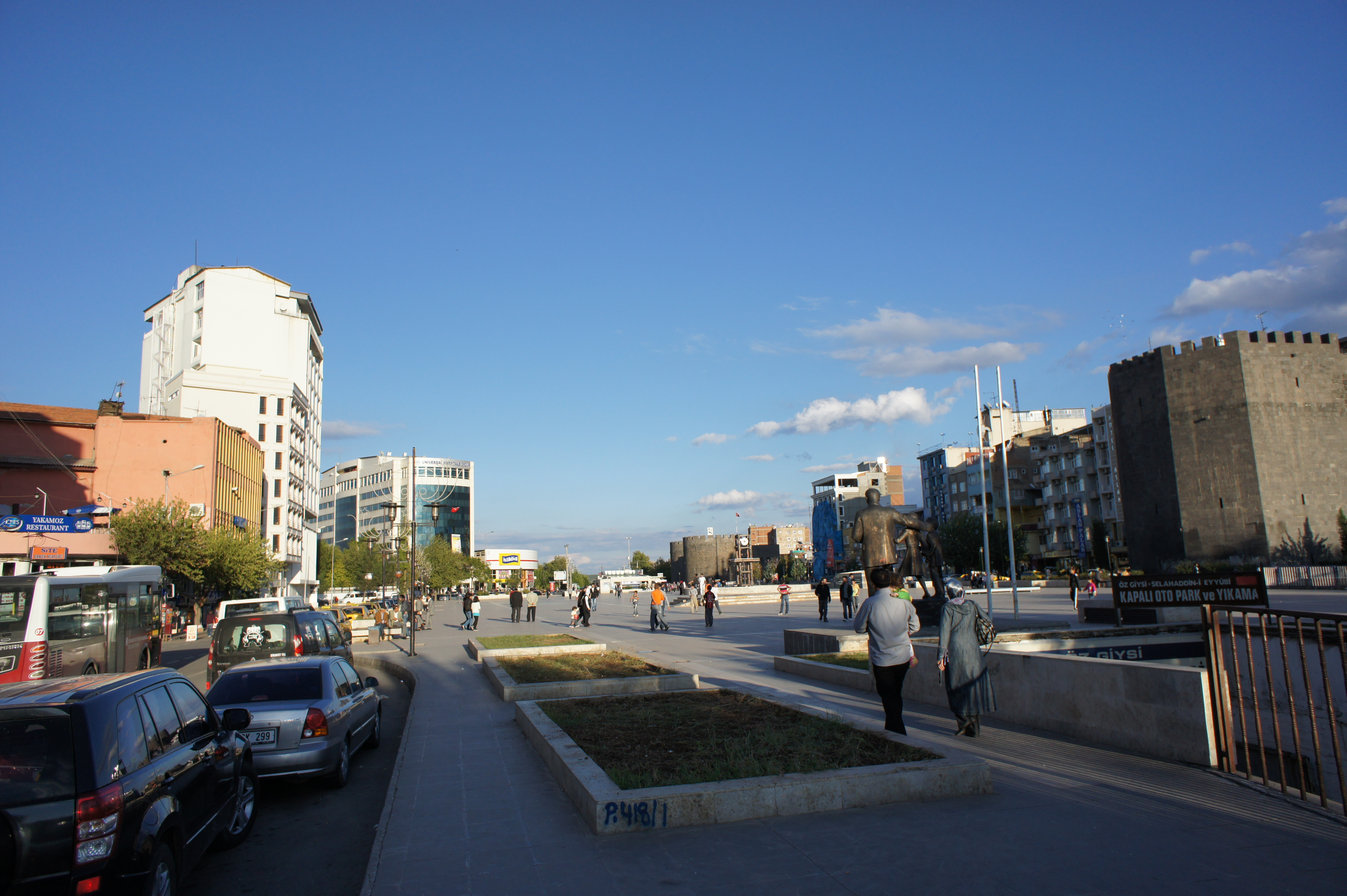 Kurdî: Deriyê Çiyê, Amed.